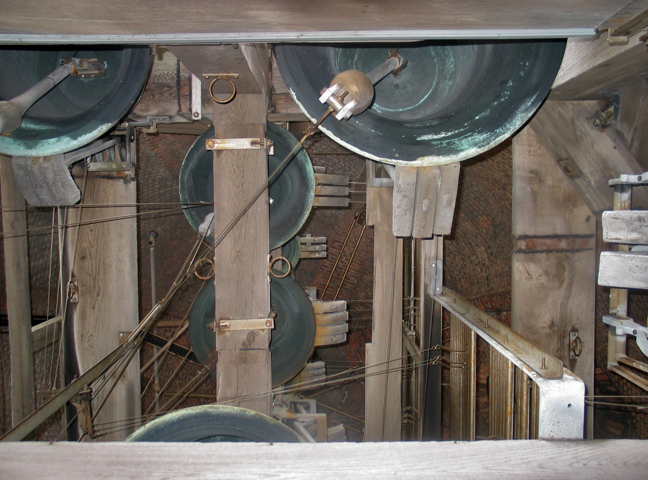 De klokken van het Belfort te Brugge